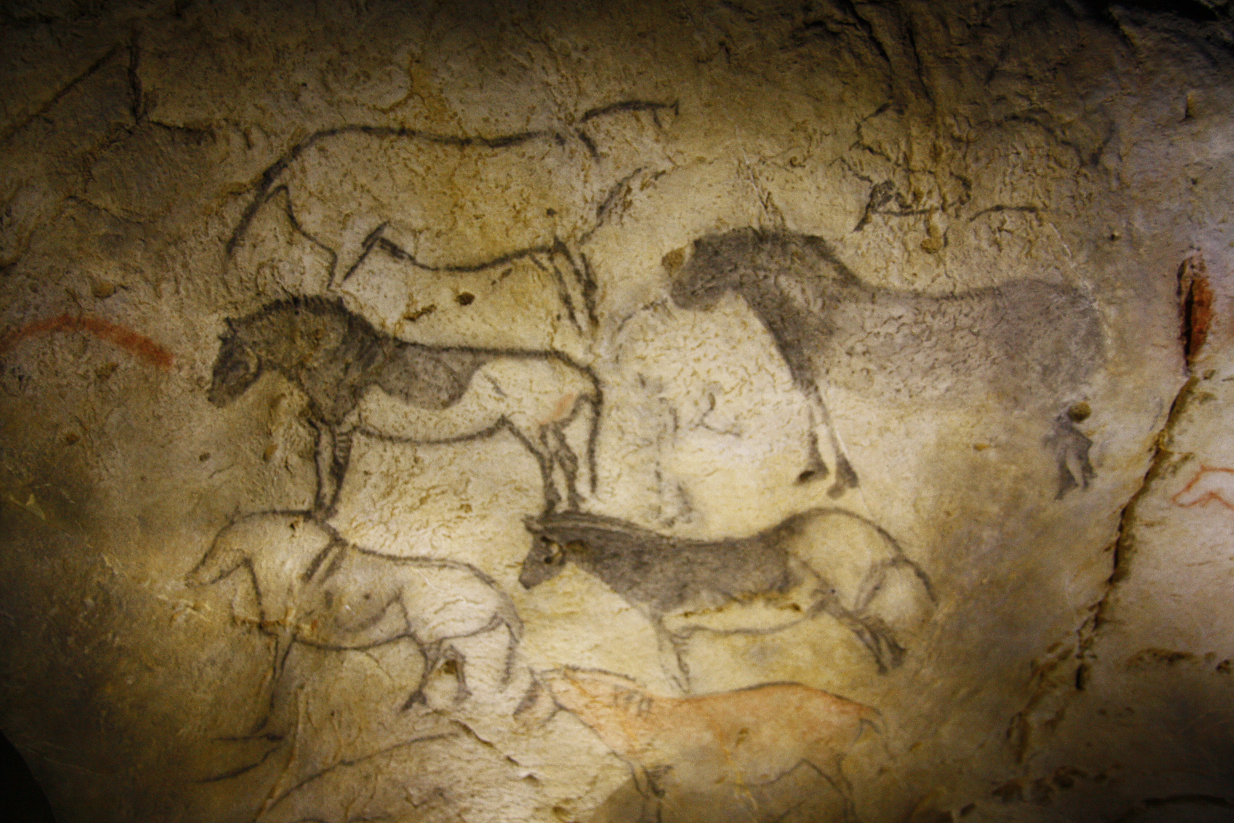 Ekainberriko zaldien irudiak.